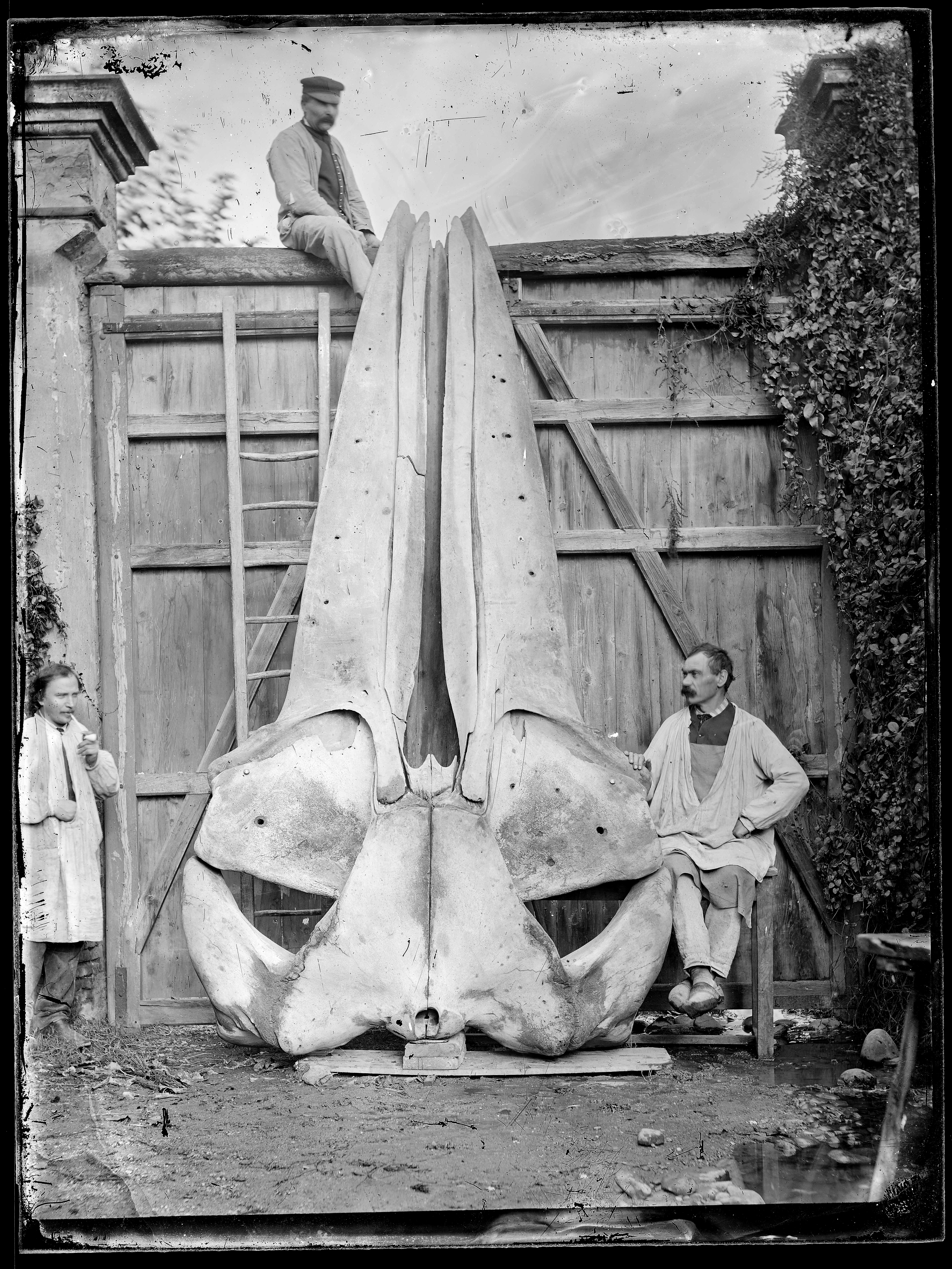 plaque négative au collodion, format 18x24 cm. Sans inscription ni mention d'auteur.